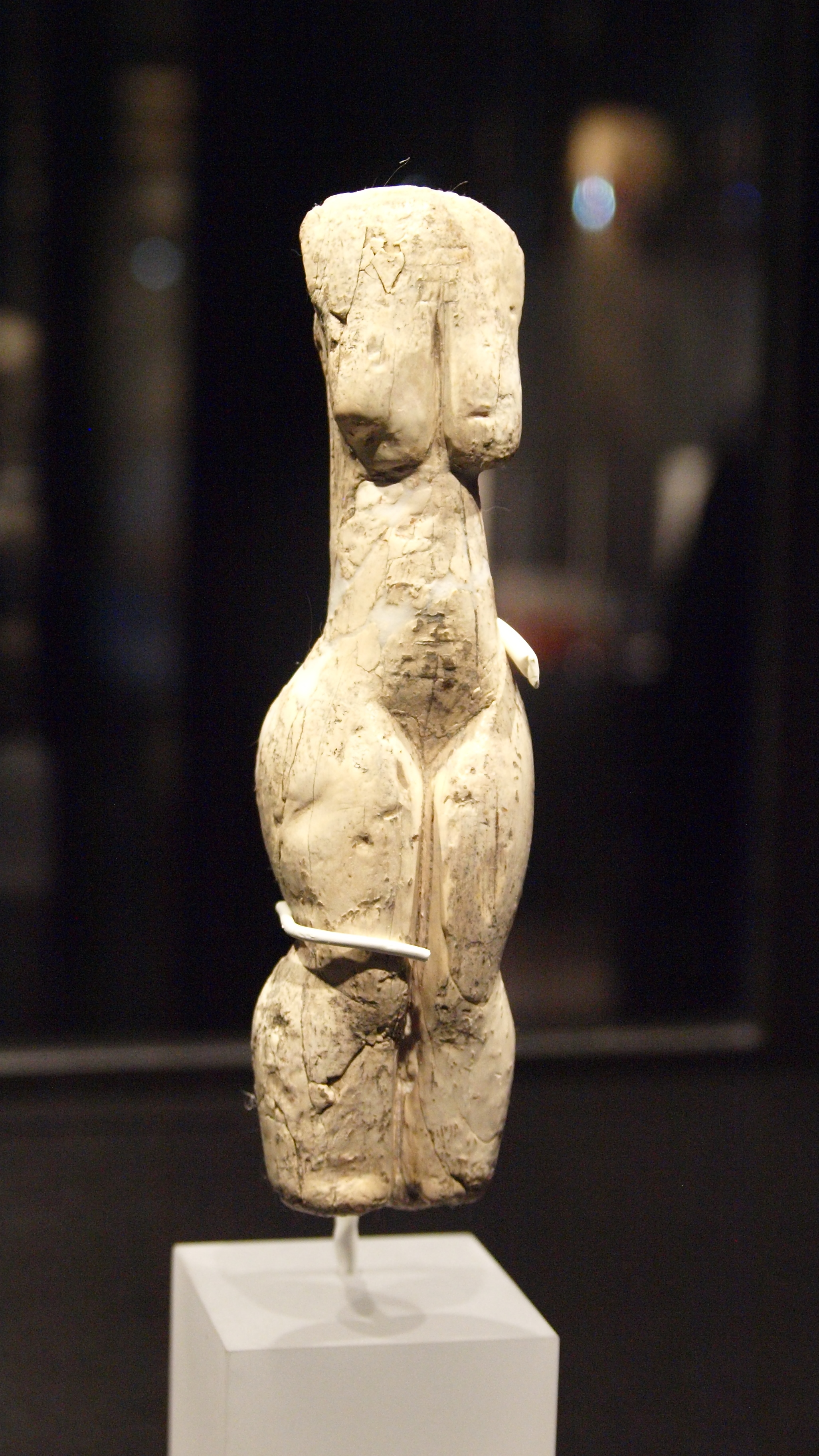 Frauenstatuette von Eliseevichi, Mammutelfenbein, Höhe: 150 mm, Epigravettien ca. 15.000 BP, Original, ausgestellt im Archäologischen Museum Hamburg (Eiszeiten - Die Kunst der Mammutjäger vom 18. Oktober 2016 bis 14. Mai 2017). Aufbewahrungsort sonst Kunstkammer Sankt Petersburg, Russland.